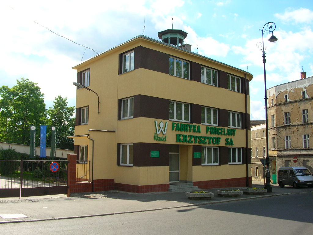 Wałbrzych - Budynek Zakładów Porcelany Stołowej "Krzysztof" S.A. przy ul.Limanowskiego.